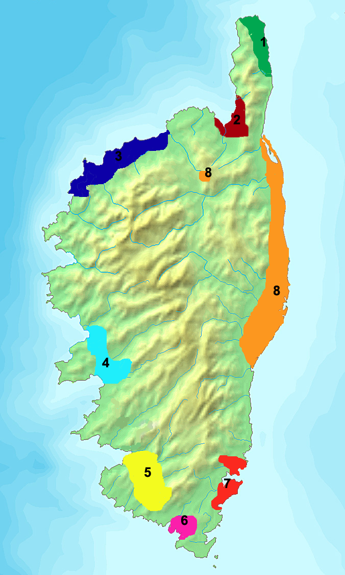 AOC-regions of corsica (Vin de Corse), based in Image:Corse.jpg (1) Cap Corse, (2) Patrimonio, (3) Balagne, (4) Ajaccio, (5) Sartène , (6) Figari, (7) Porto-Vecchio, (8) Cote orientale